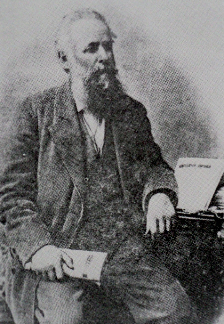 Скенирано из књиге Комунисти Југославије 1919.-1979., Експорт прес, Београд, 1979. година